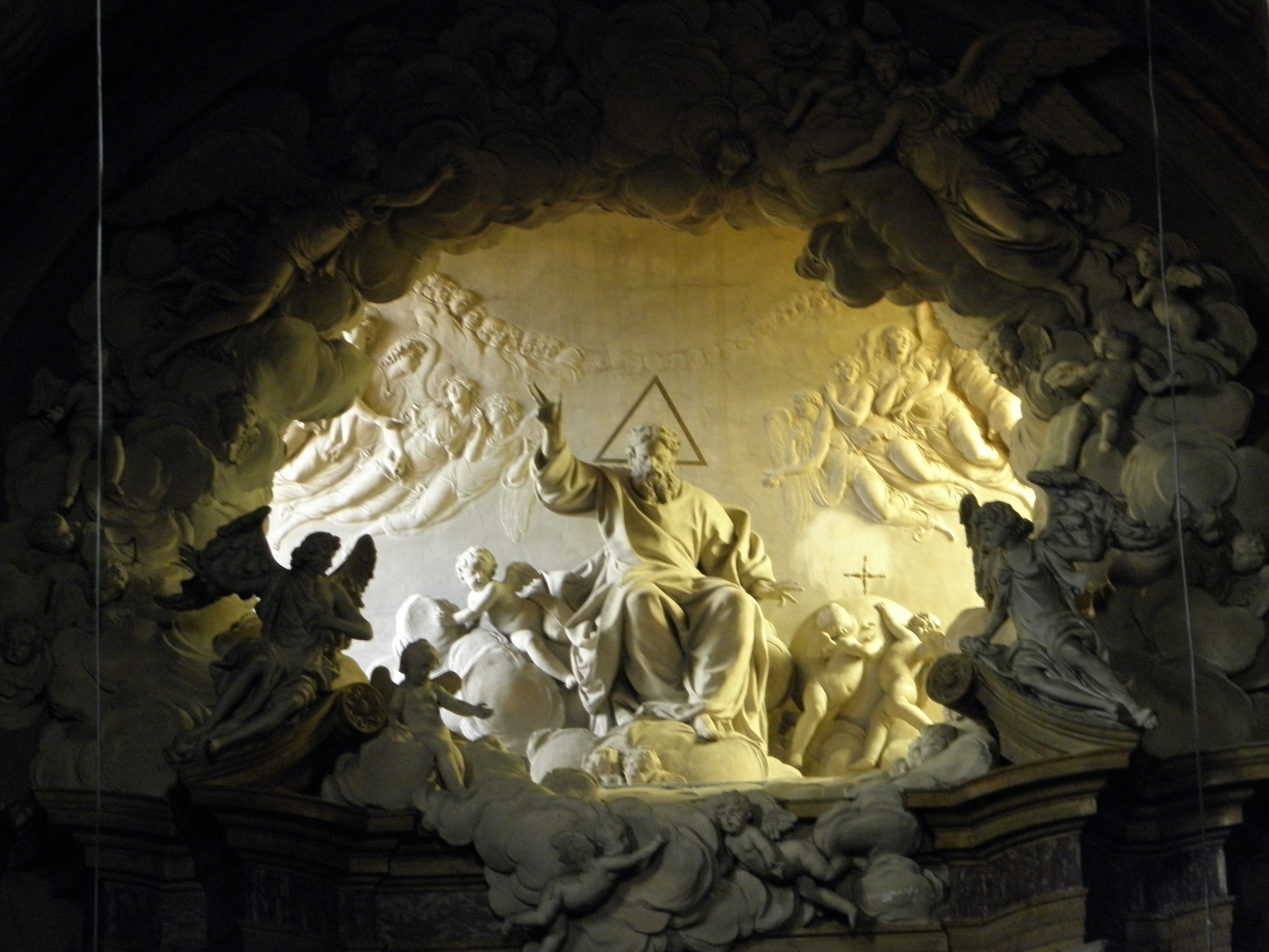 Minerbio: il "Gloria", opera scultorea di Giuseppe Mazza, posta sulla volta sopra l'altare maggiore della chiesa parrocchiale di San Giovanni Battista.